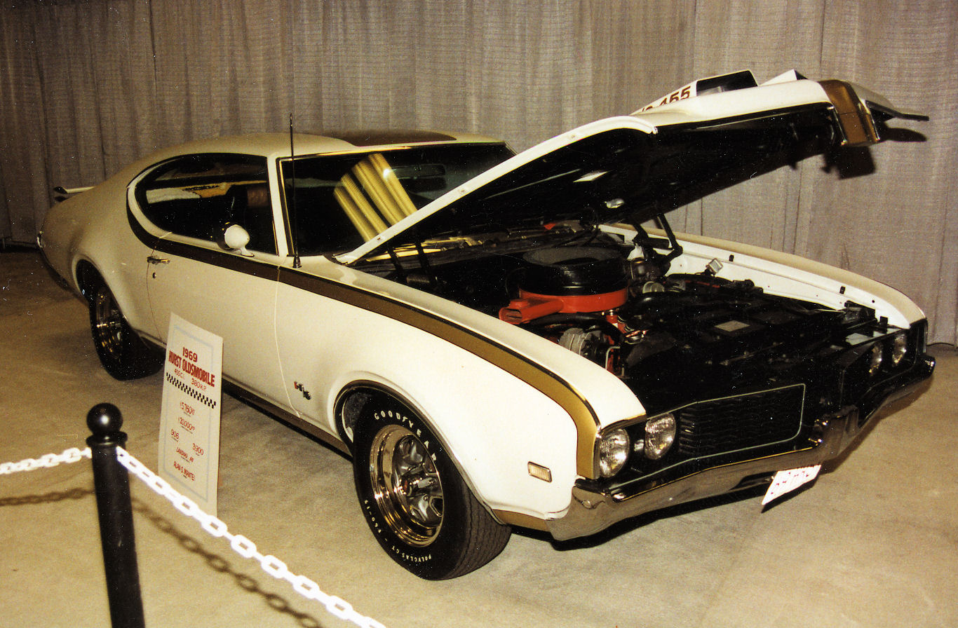 A stock 1969 Hurst/Olds.